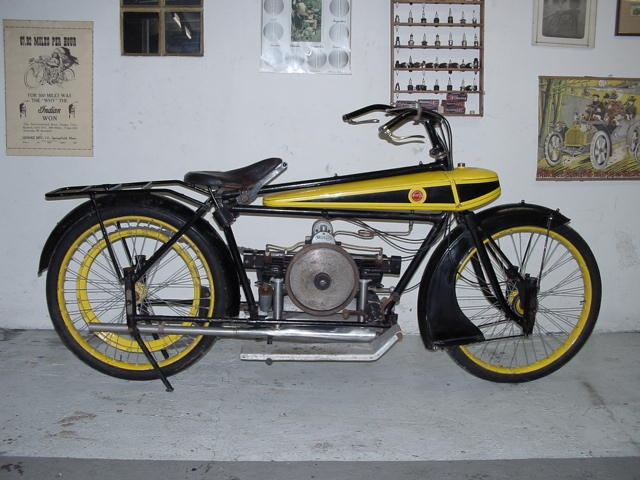 Toestemming van Yesterdays Antique Motorcycles